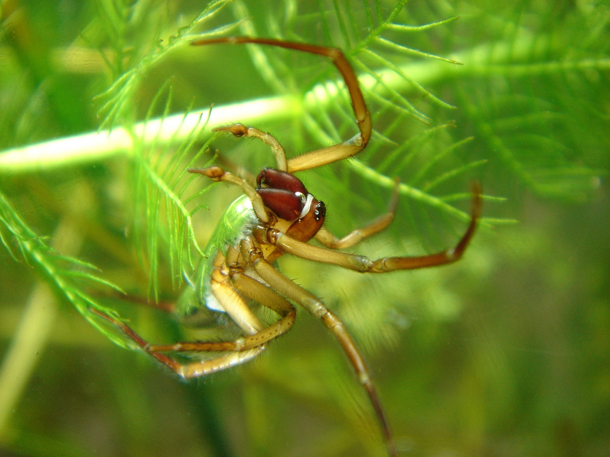 Männchen der Wasserspinne Argyroneta aquatica. Fundort: Wien Prater. Aquarienaufnahme.